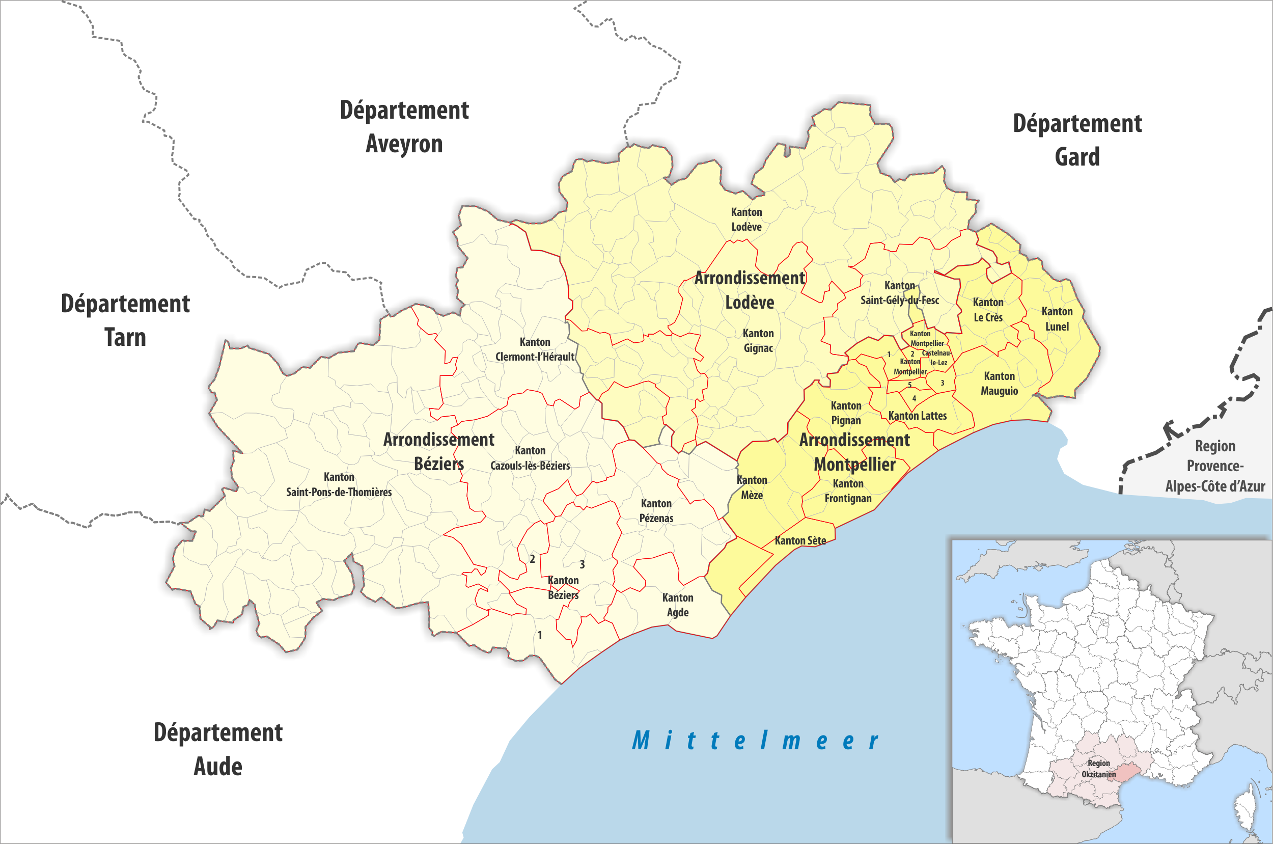 Gemeinden, Kantone und Arrondissemente im Departement Hérault